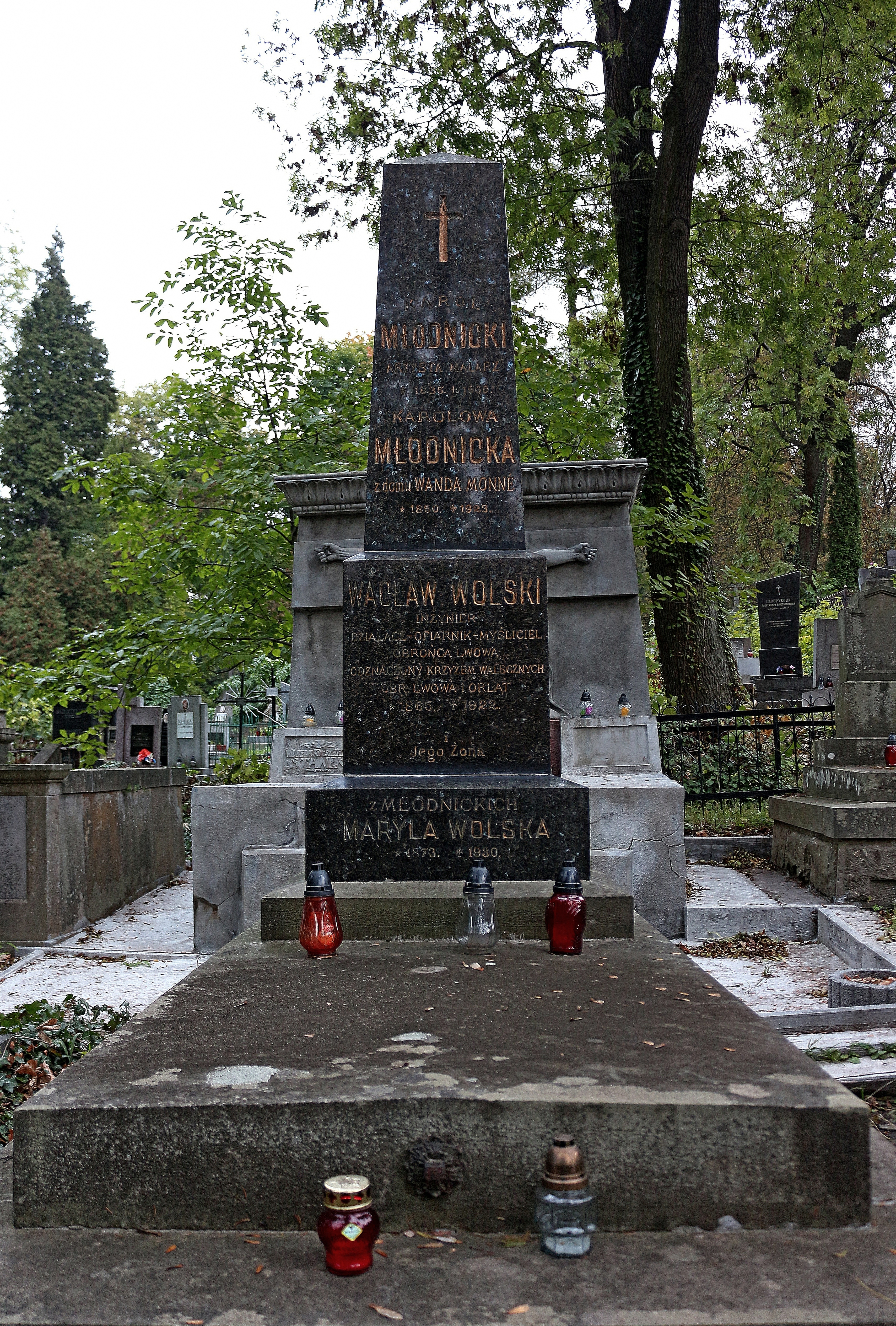 Гробівець Млодніцких - Вольських. Личаківський цвинтар , поле № 59.